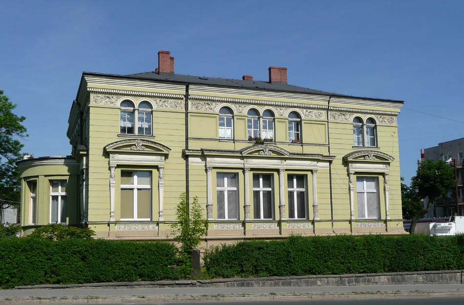 Bielawa